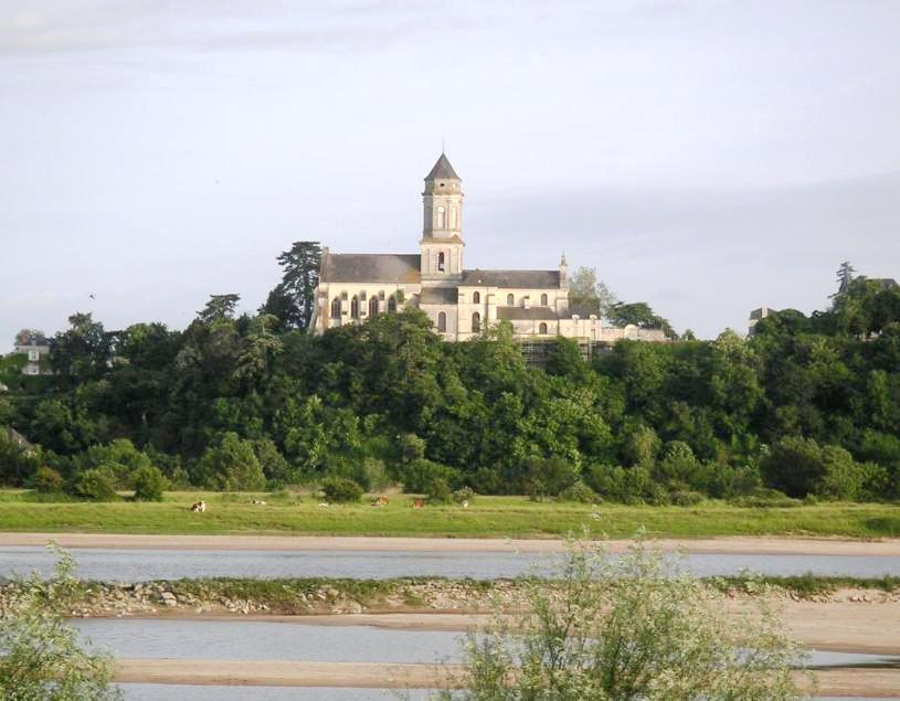 Vue de l'église de Saint-Florent-Le-Vieil, en haut du Mont Glone, depuis la Meilleraie, de l'autre côté de la Loire.